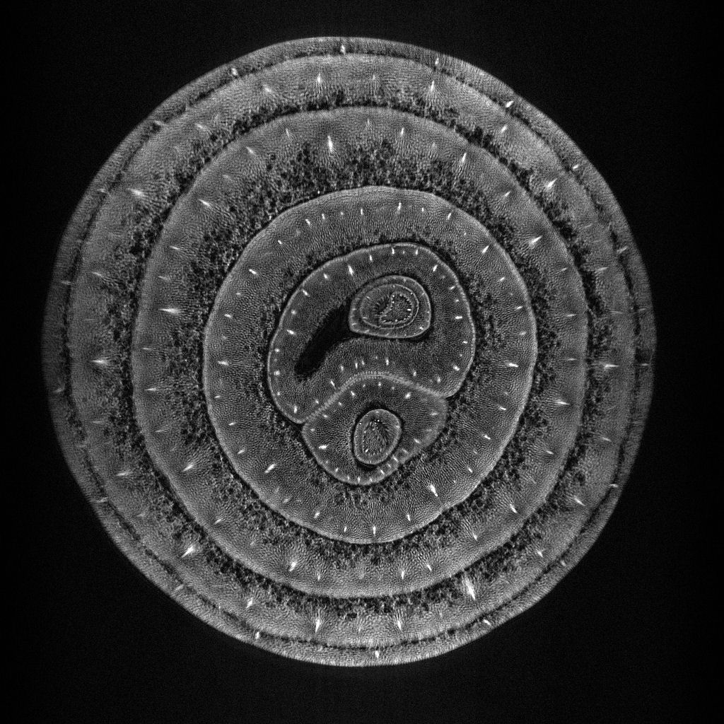 ペコロスを，スライス厚0.64mm，面内画素サイズ40μm平方で撮像した画像です．マトリクスは1024×1024です．